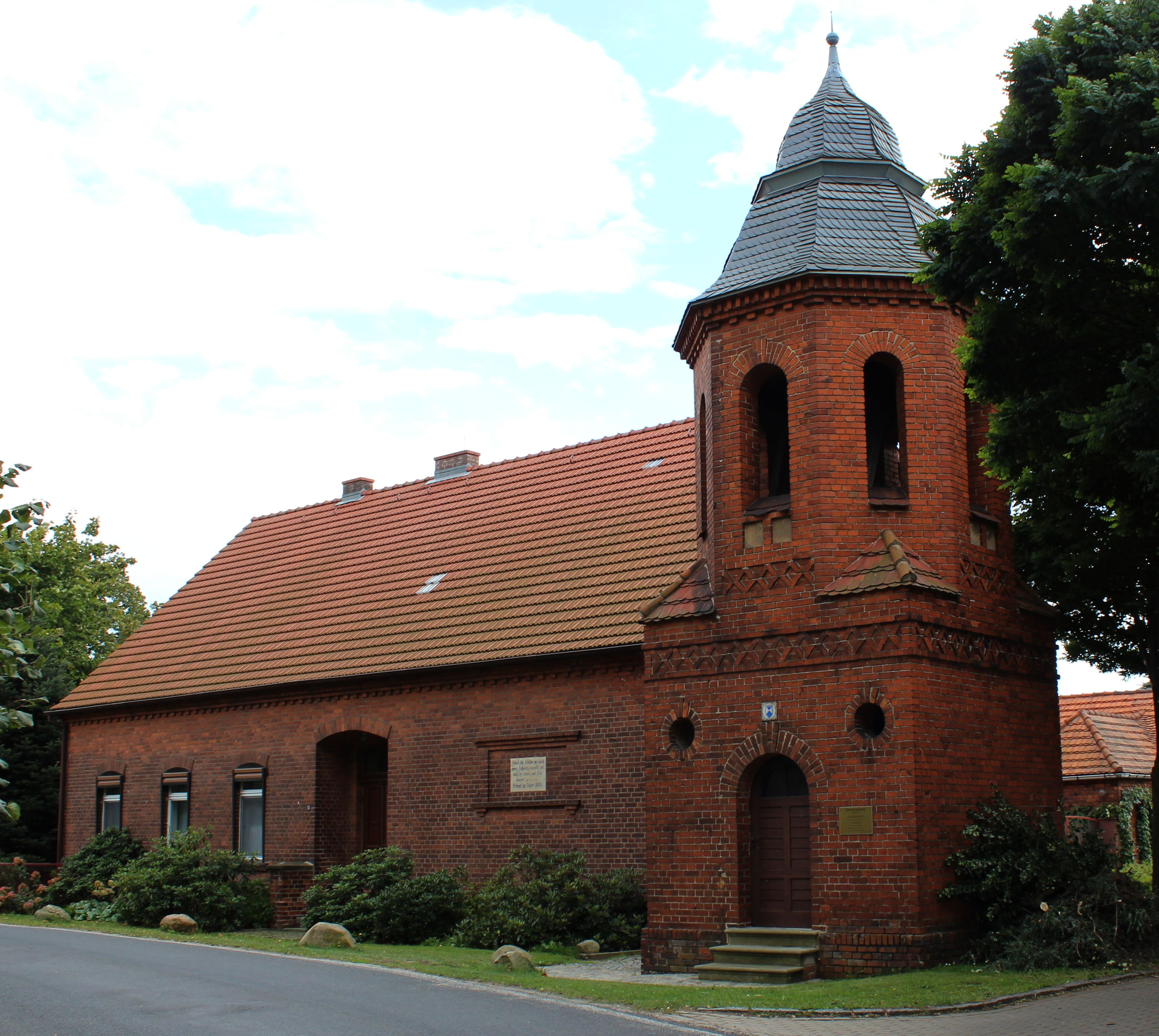 Die unter Denkmalschutz stehende alte Dorfschule von Zeischa.